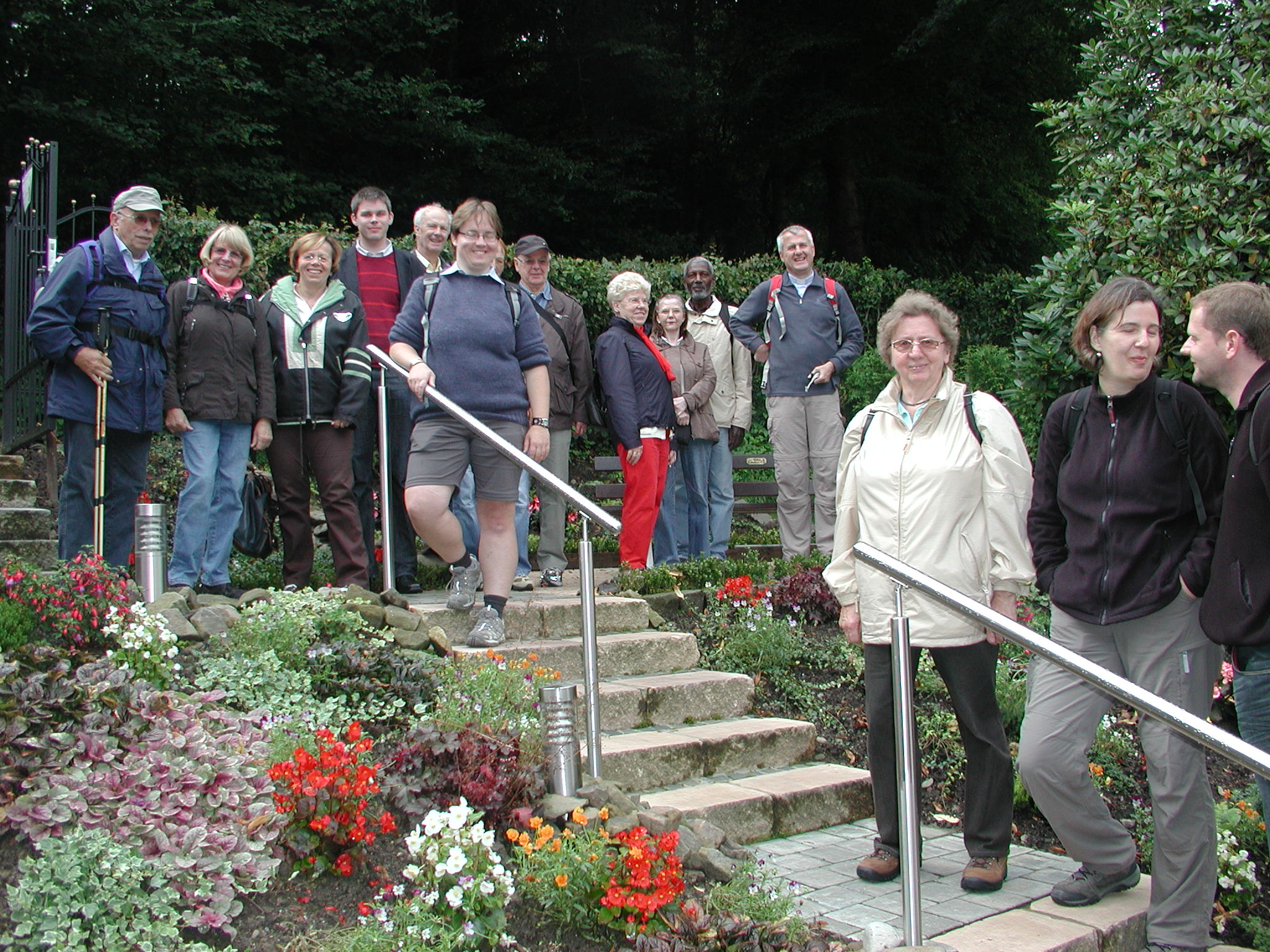 Pilgergruppe an der Kapelle Maria Schnee in Ennepetal, nahe Wuppertal-Beyenburg, 2010